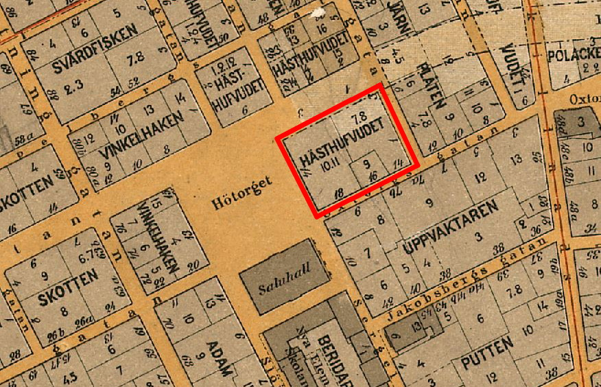 Del av "Karta ”Bladet Gustaf Adolfs torg” 1909" visande Hötorget och Konserthusets tomt